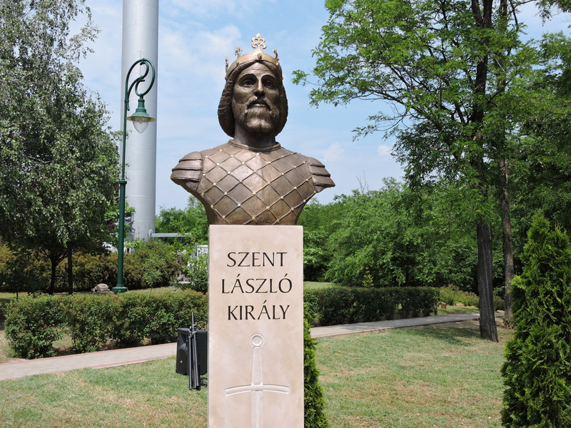 Juha Richárd: Szent László (bronz mellszobor), Nyíradony